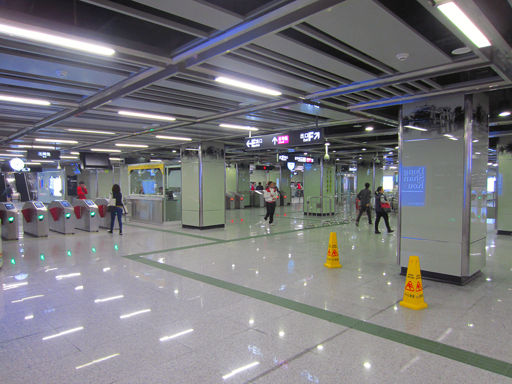 東山口6號線站廳